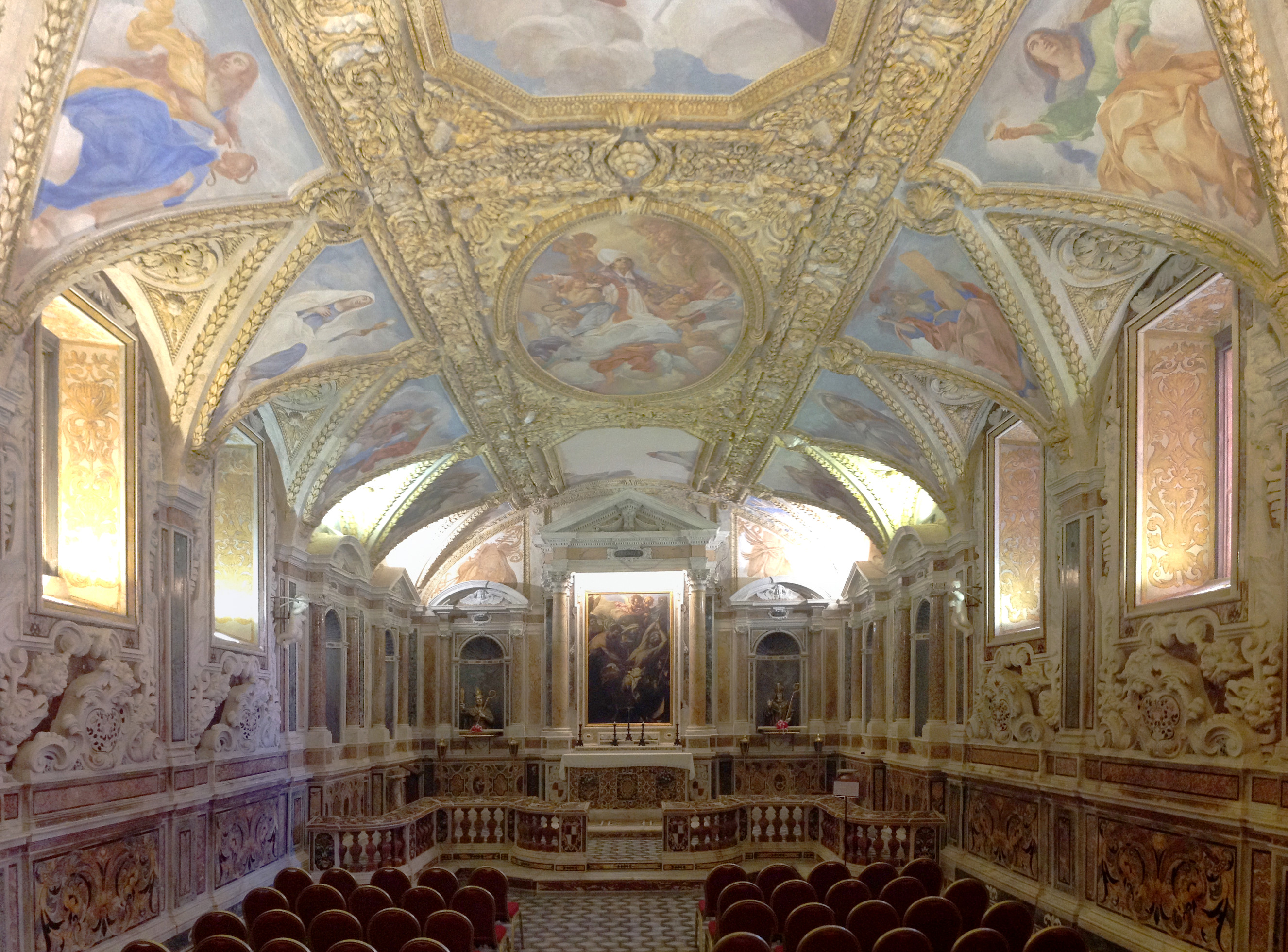 Il succorpo.